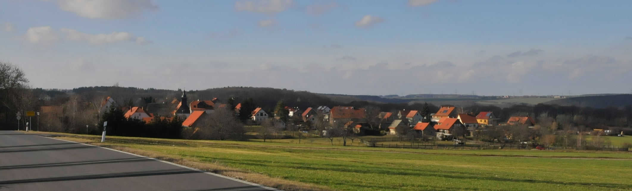 Mechelroda